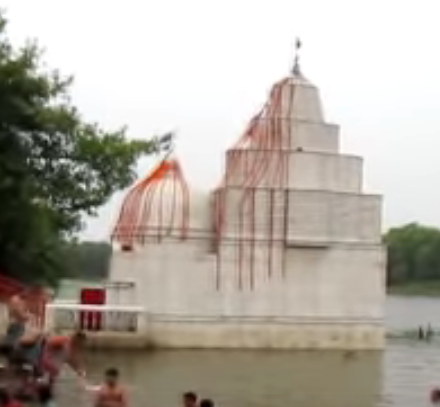 পুকুরের মন্দির